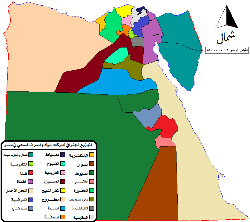 خريطة التوزيع الجغرافي لشركات المياه والصرف الصحي في مصر عام 2012